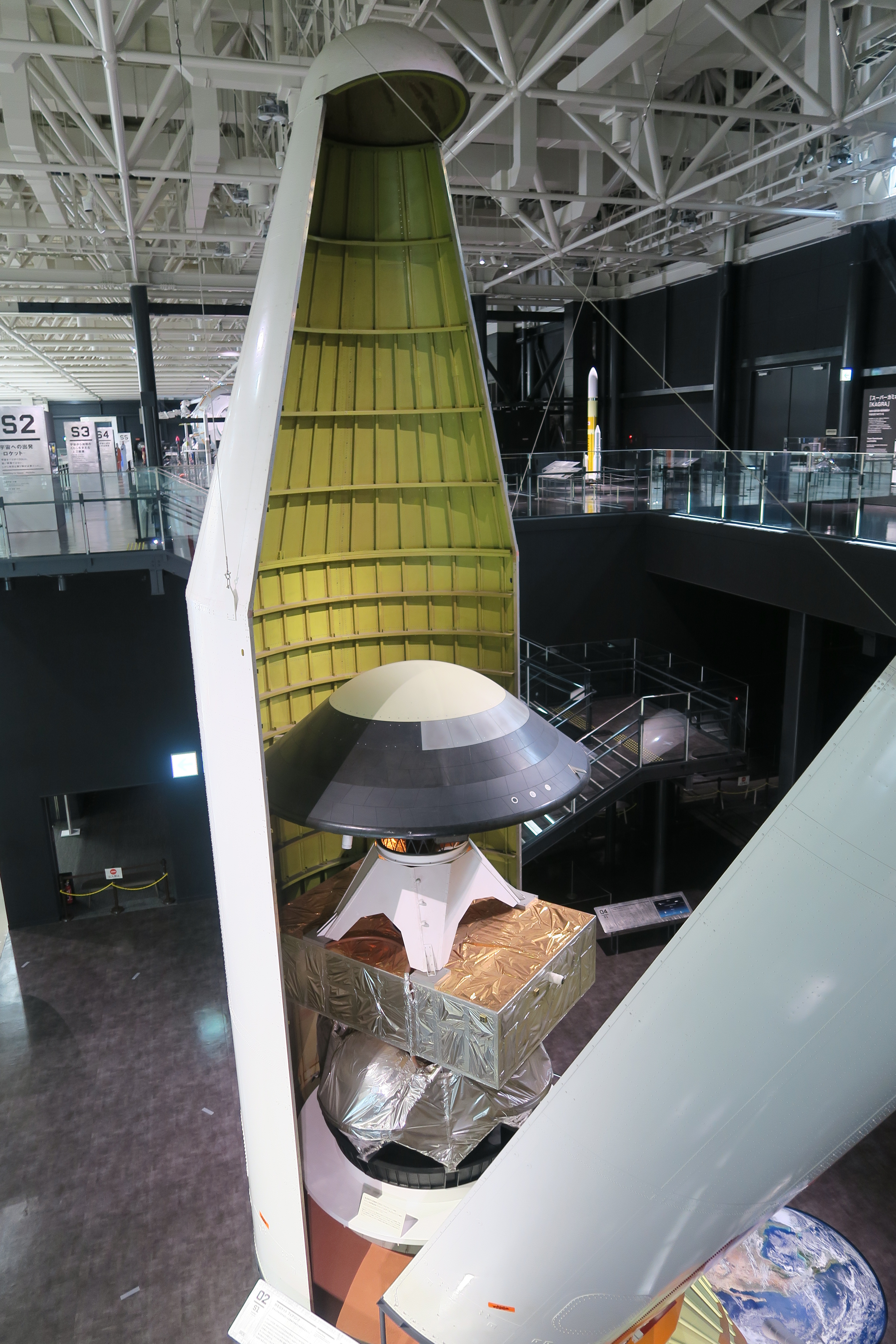 H-IIロケット フェアリング。軌道再突入実験機りゅうせい、ロケット性能確認用ペイロードみょうじょう 搭載。フェアリングは分離（開頭）試験に使用したもので、搭載物は1/1模型。